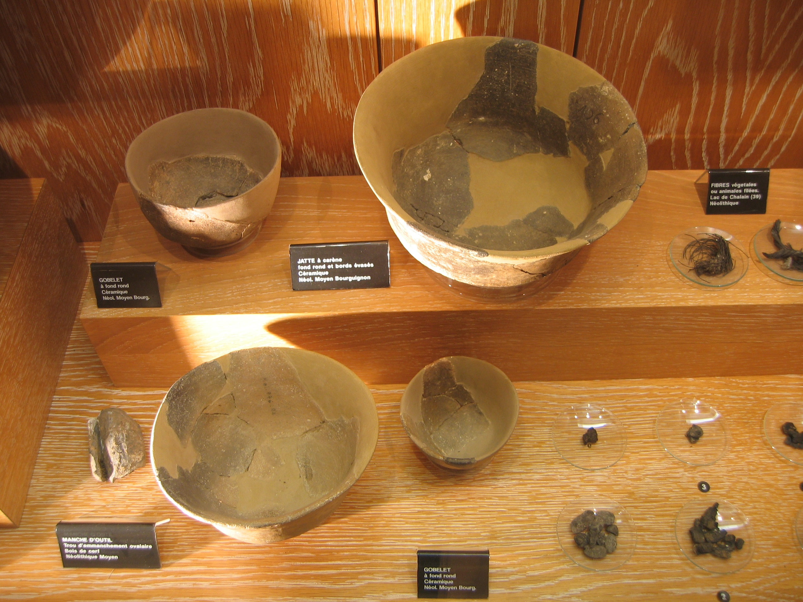 gobelets jattes outils musée archéologique Dijon France